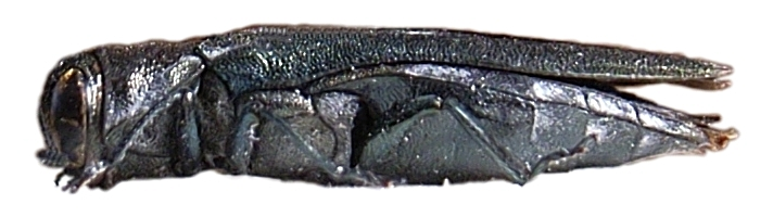 Agrilus ater